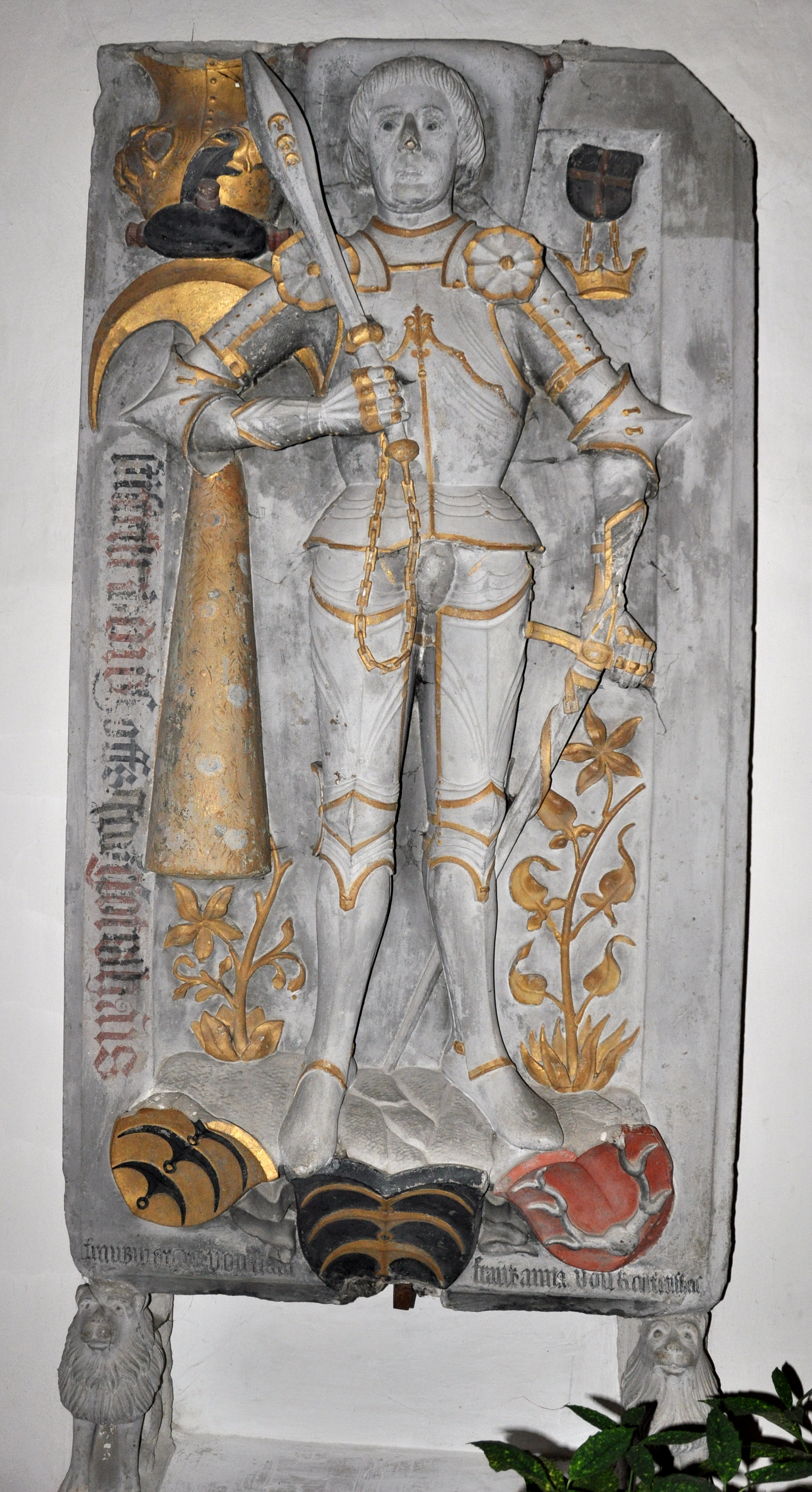 Oberstadion (Alb-Donau-Kreis), Pfarrkirche St. Martinus, Epitaph Hans von Stadion († 1458), geschaffen 1489 von Jörg Syriln d. J. Siehe auch Bildindex und Julius Baum 1911, S. 55